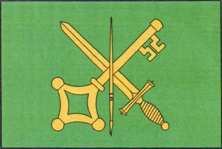 vlajka, Žlunice, okres Jičín